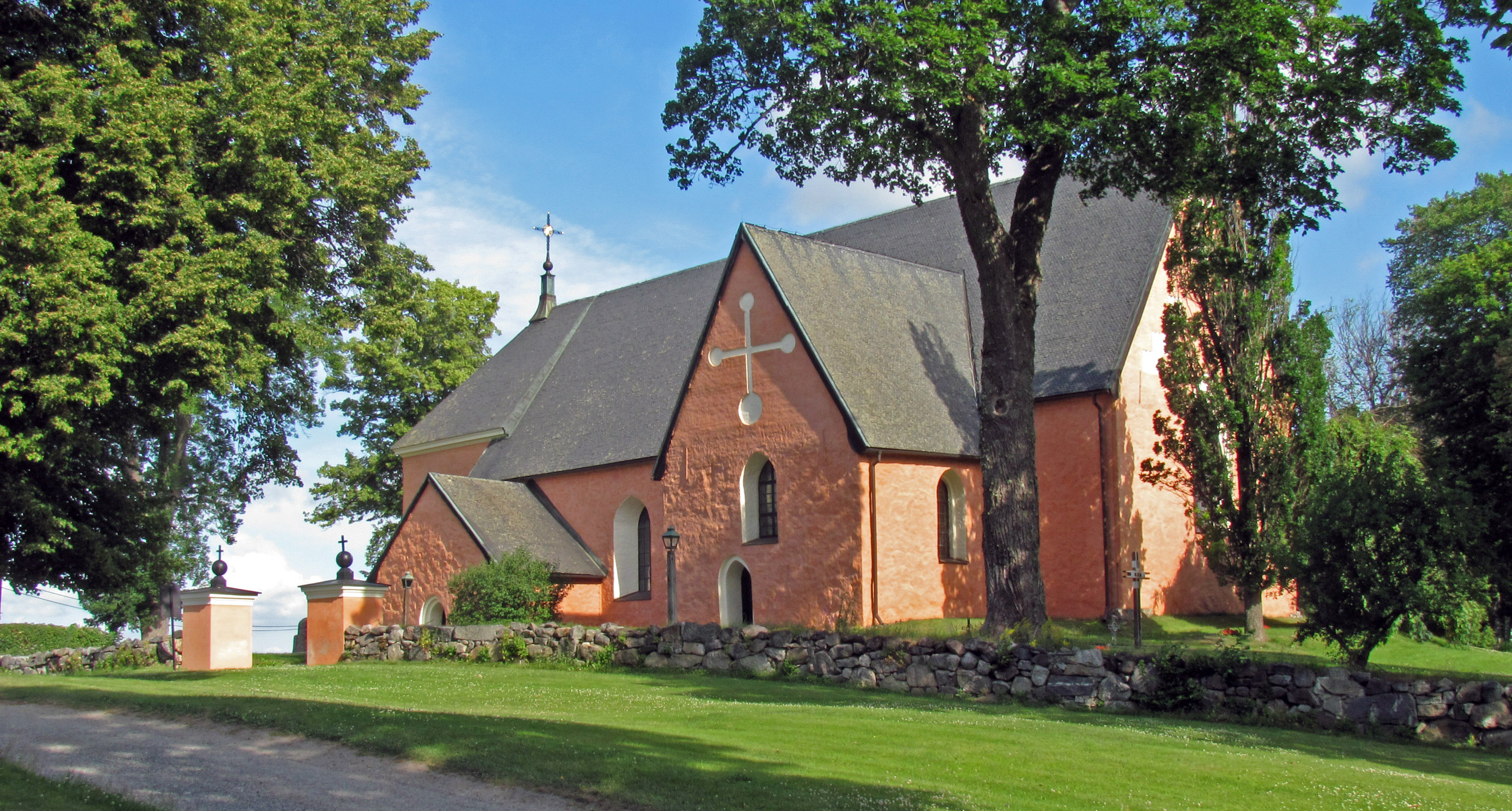 Toresunds kyrka